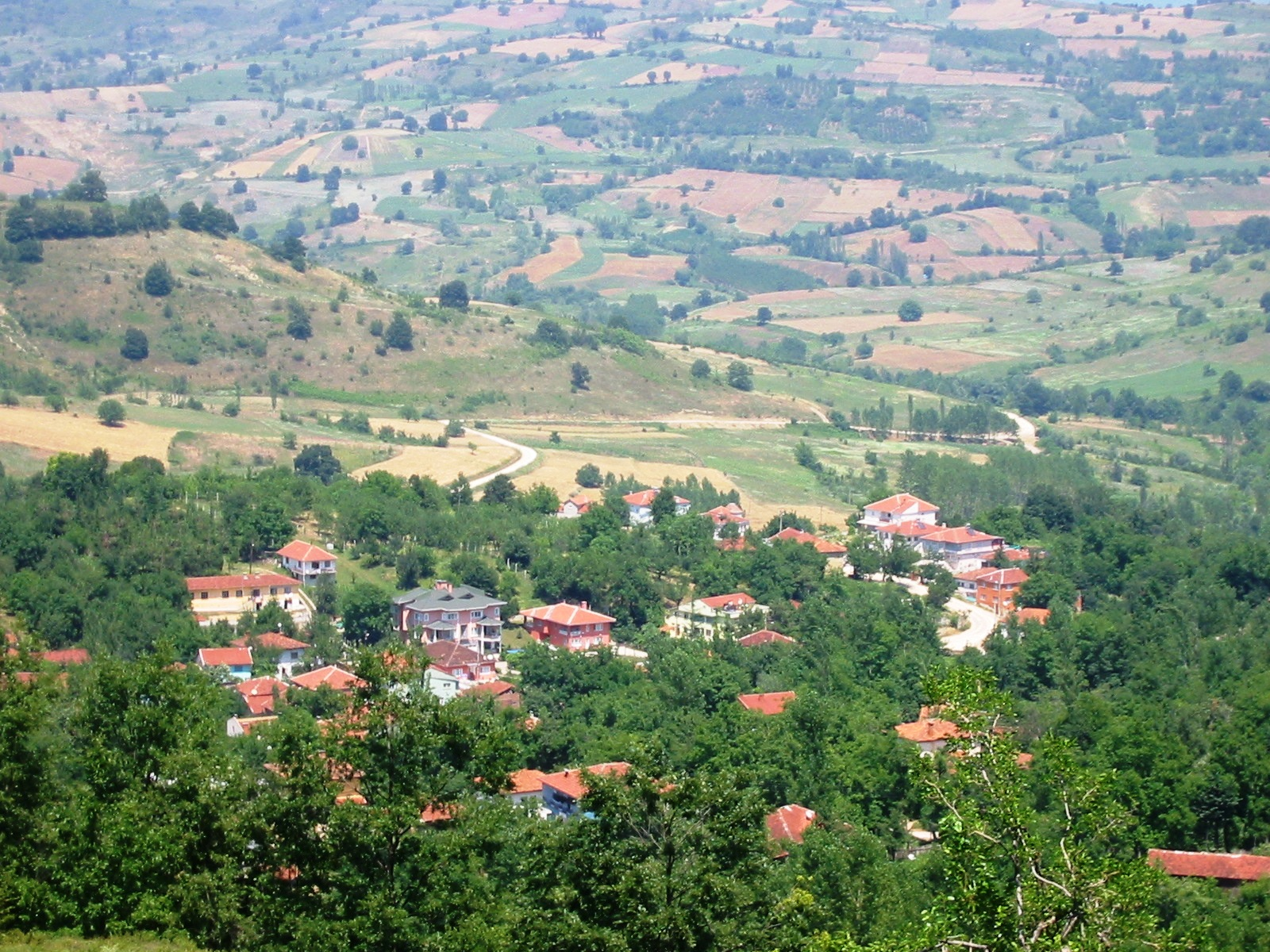 View of Hayriye, Bursa-Inegöl